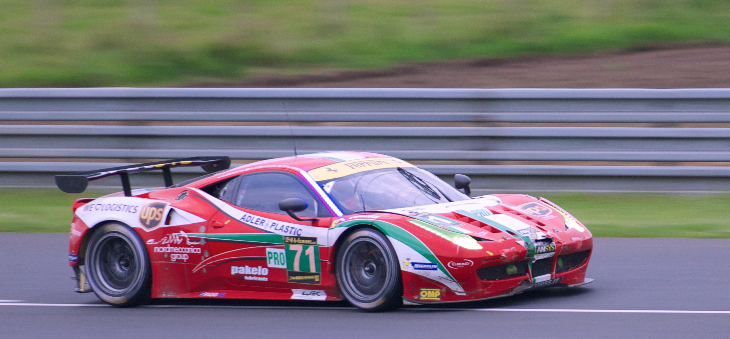 KAM_5180